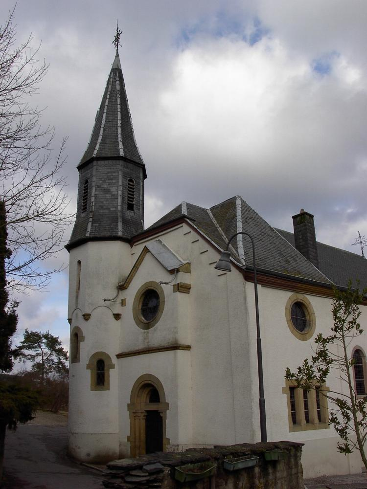 D'Kierch vun Äischer vu baussen. Photo vum Paschtouer Francis Erasmy.